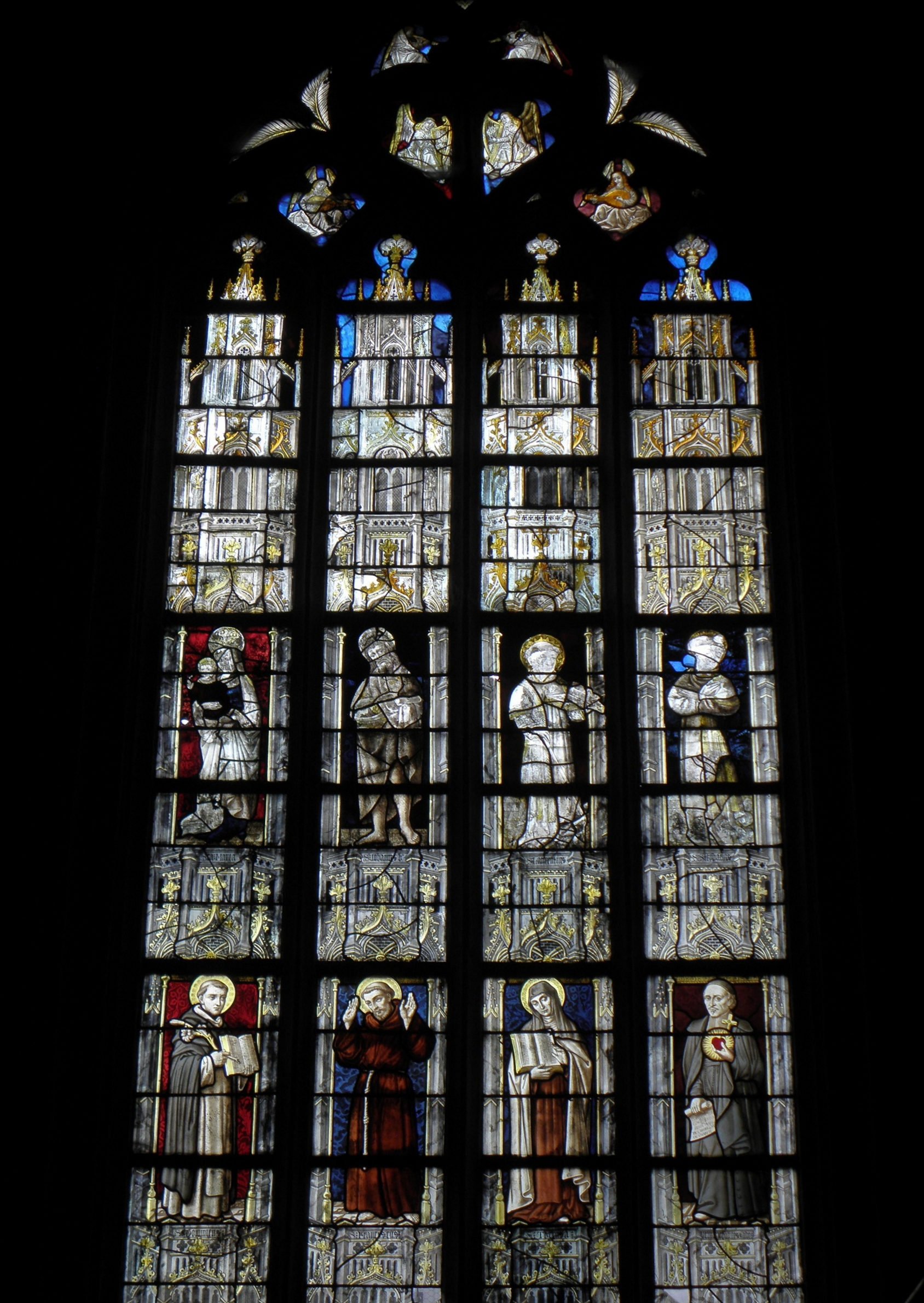 Baie 14 de la basilique Notre-Dame-du-Roncier de Josselin (56). Datation: v. 1470-1480 et v. 1890-1895. Maître-verrier: atelier Hucher et Carmel du Mans. Description: 1er registre: Saint-Dominique, Saint-François-d'Assise, Sainte-Thérèse-d'Avila et Saint-Jean-Eudes.; 2d registre: Vierge à l'Enfant, Saint-Jean-Baptiste, Saint-Laurent et Saint-Étienne; Tympan: anges musiciens.